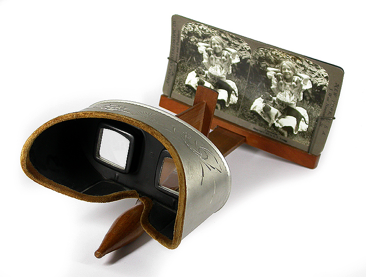 Deutsches Kameramuseum Plech: Stereoskop